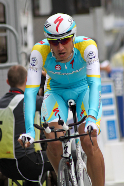 Prologue du Critérium du Dauphiné 2011, Saint Jean de Maurienne